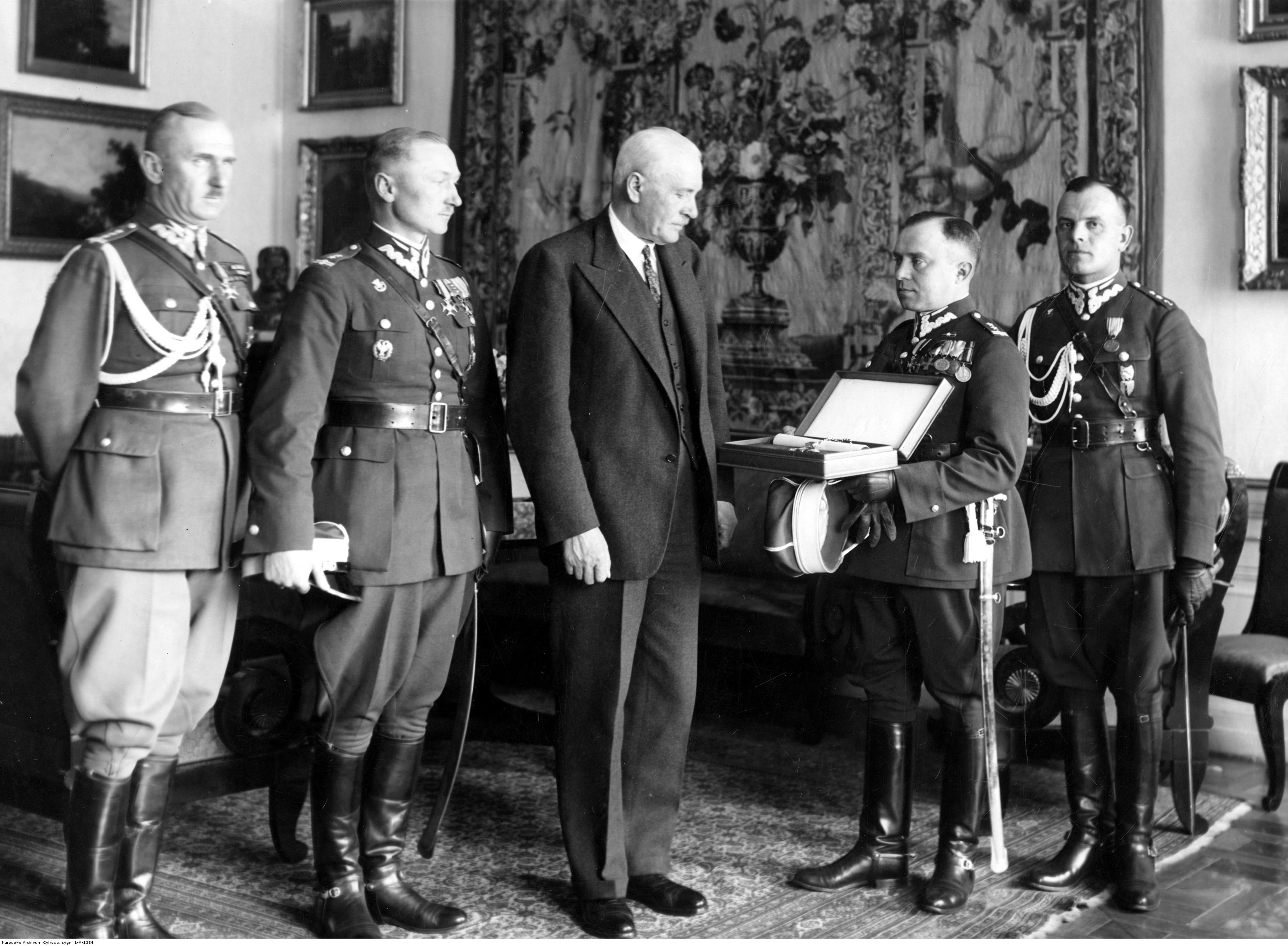 Delegacja 2. Pułku Ułanów Grochowskich na audiencji u prezydenta RP Ignacego Mościckiego